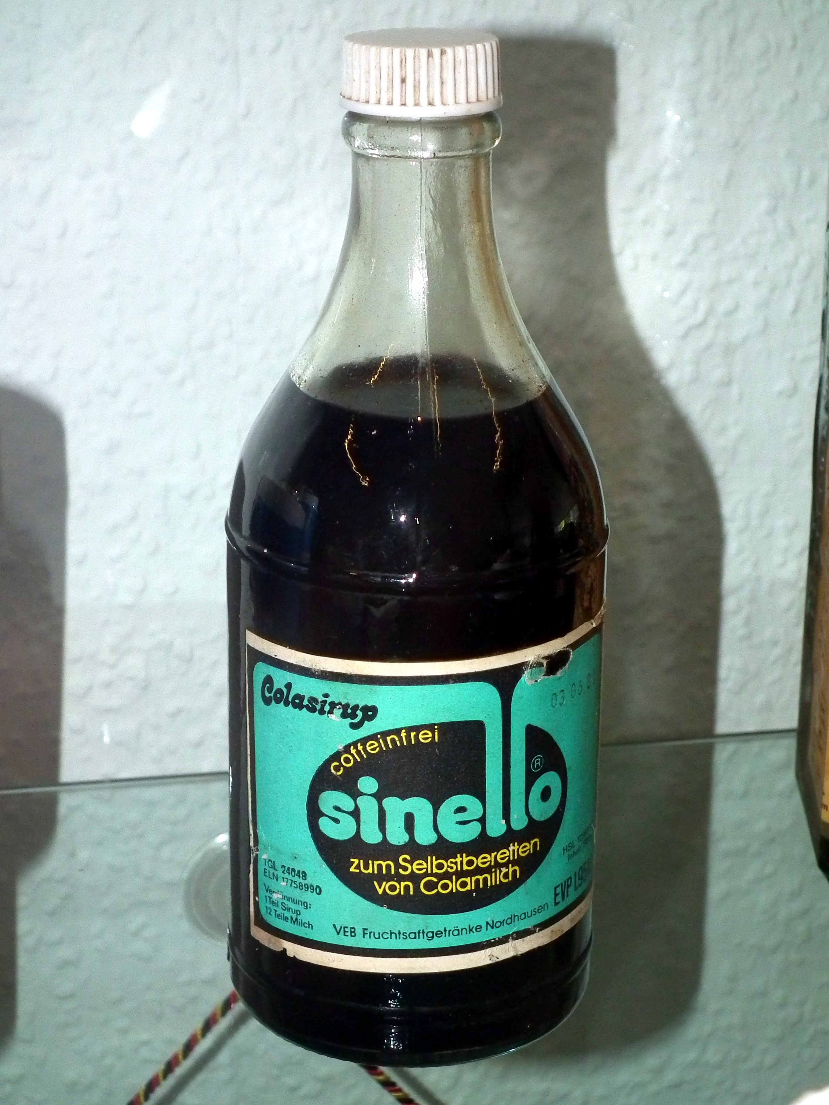 DDR-Museum Pirna, Colasirup sinello, Veröffentlicht mit Genehmigung der Museumsleitung